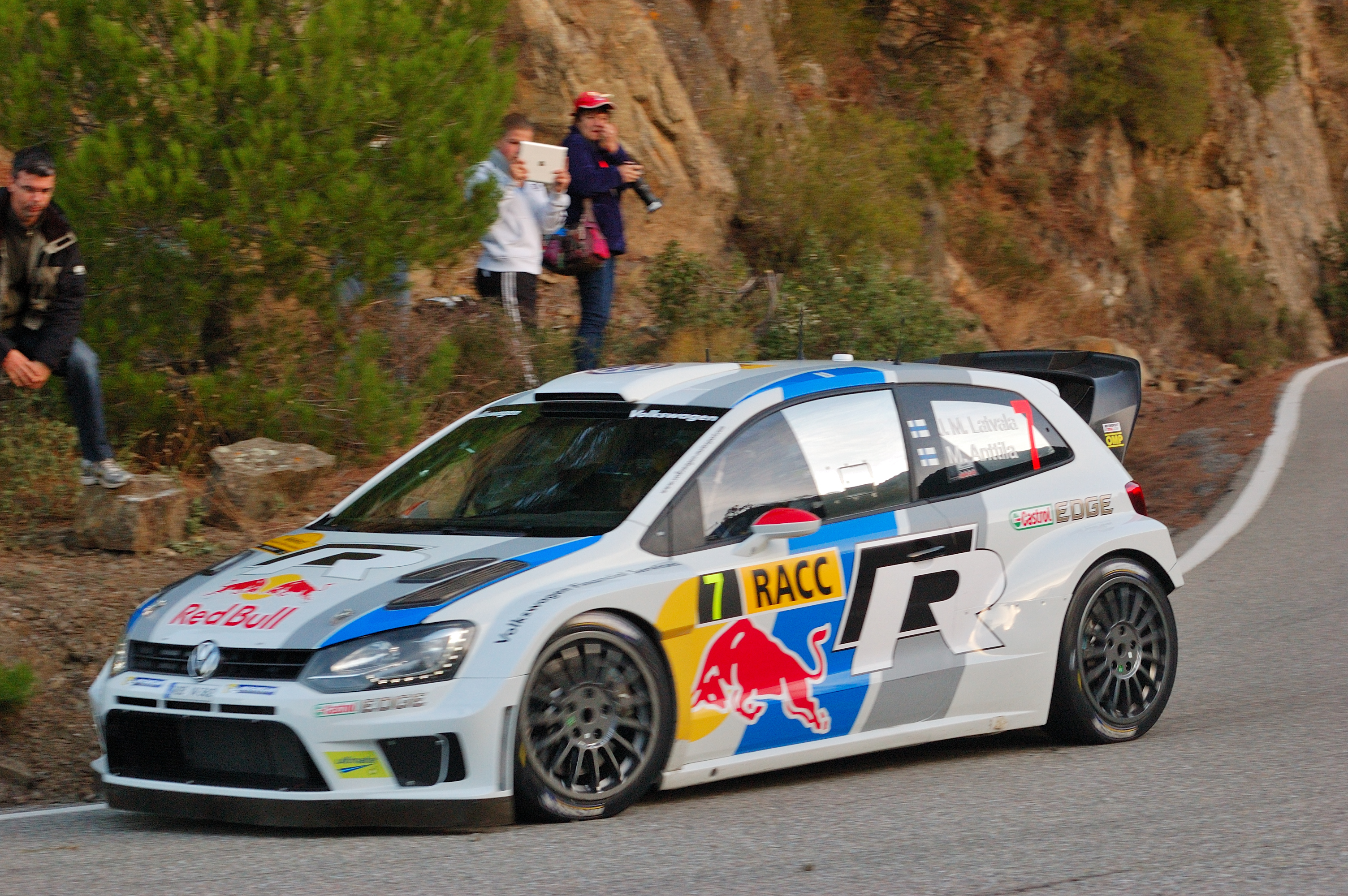 Latvala/Antila SS4 Riudecanyes - Rally Catalunya 2013